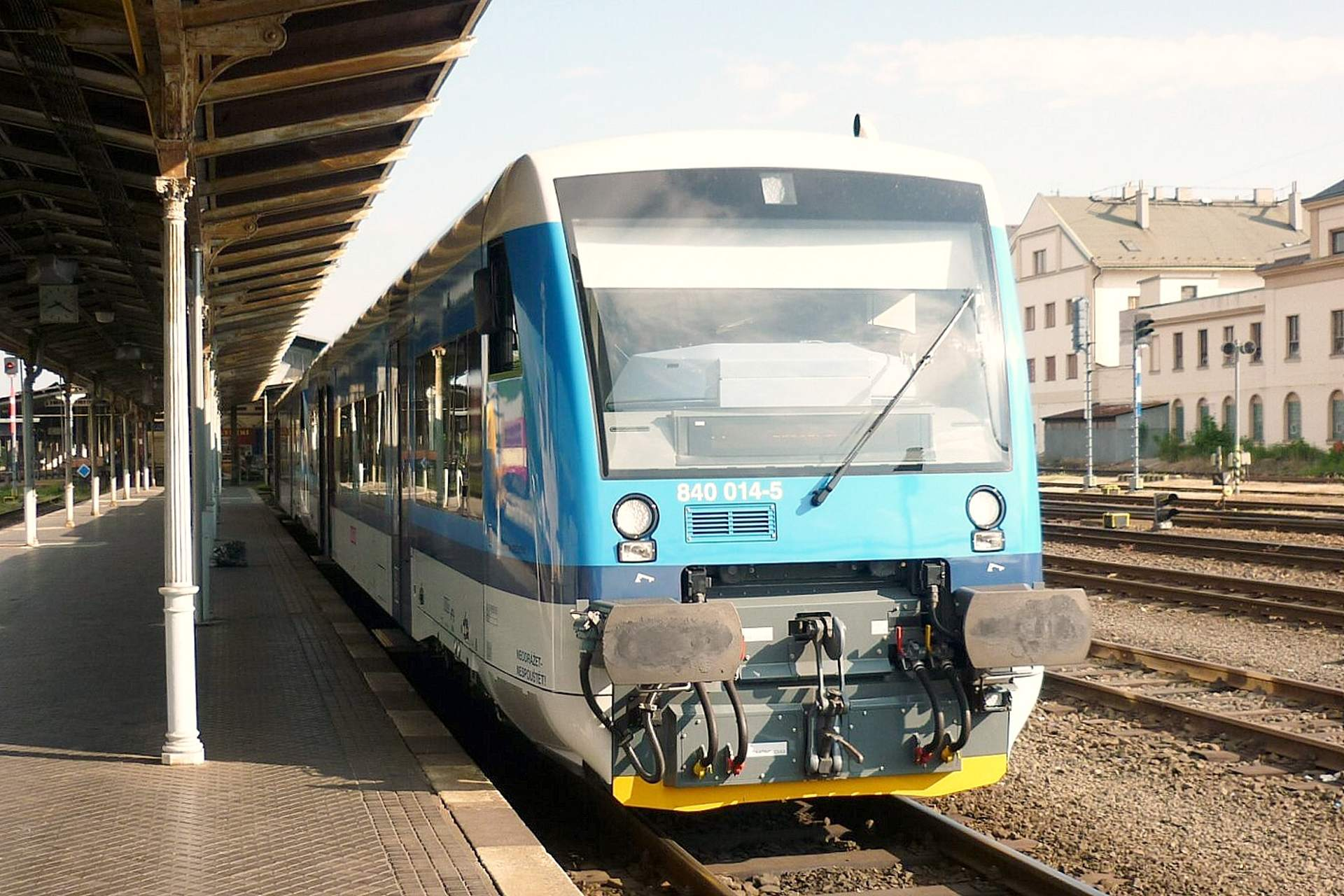 Liberec vlakové nádraží